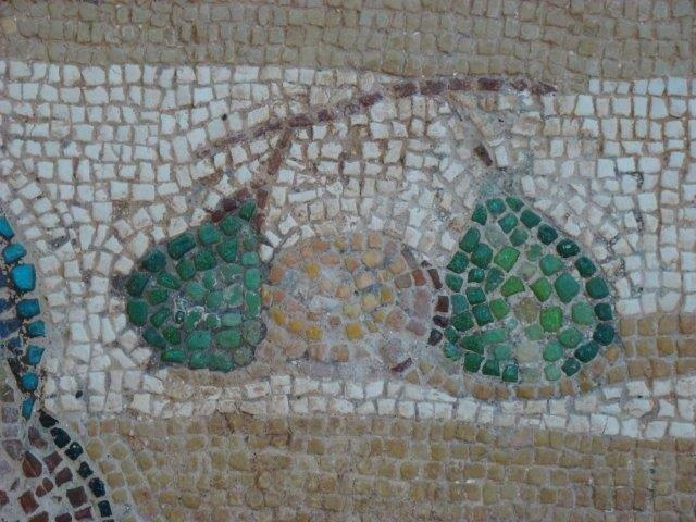 pears